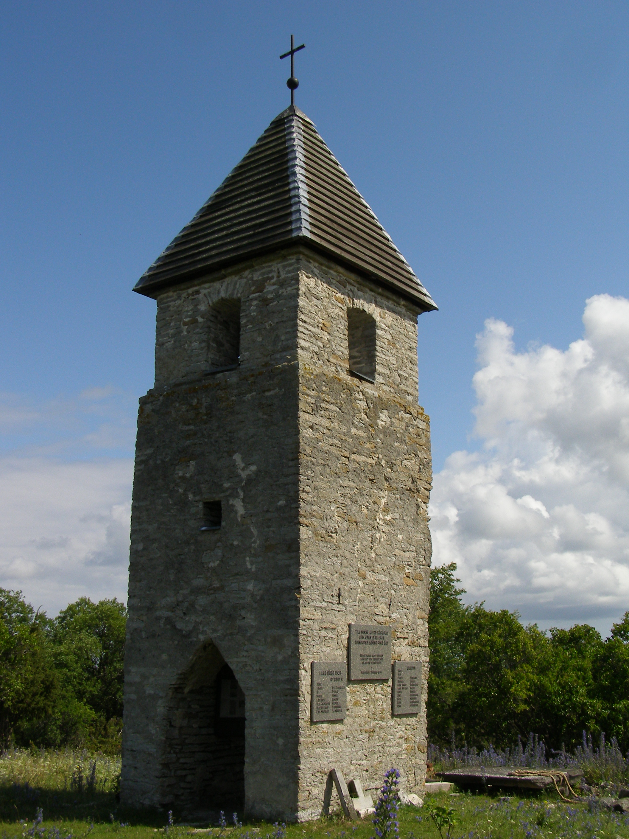 Väike-Pakri kirikutorn